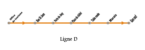 PROBUS